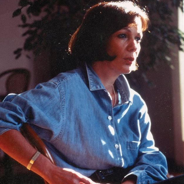 Esther Cohen. escritora e investigadora mexicana